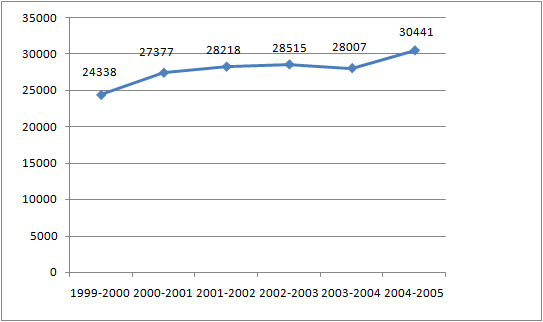 Evolution du nombre de licenciés de 1999 à 2005 à la Réunion